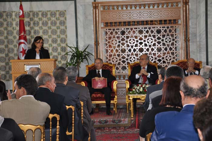 [Houda Trabelsi] Latifa Lakdhar, vice chair of the High Commission for the Realisation of Revolutionary Goals, addresses attendees and politicians at the group's last session. لطيفة لخضر نائبة رئيس اللجنة العليا لتحقيق أهداف الثورة تخاطب الحضور والسياسيين خلال اجتماع للجنة Latifa Lakdhar, vice-présidente de la Haute instance pour la réalisation des objectifs de la révolution, s'adresse aux participants divers et aux responsables politiques réunis à l'occasion de la dernière session du groupe.